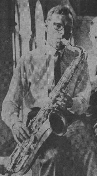 Arkitekten Bengt Brunnström (beskuren bild)